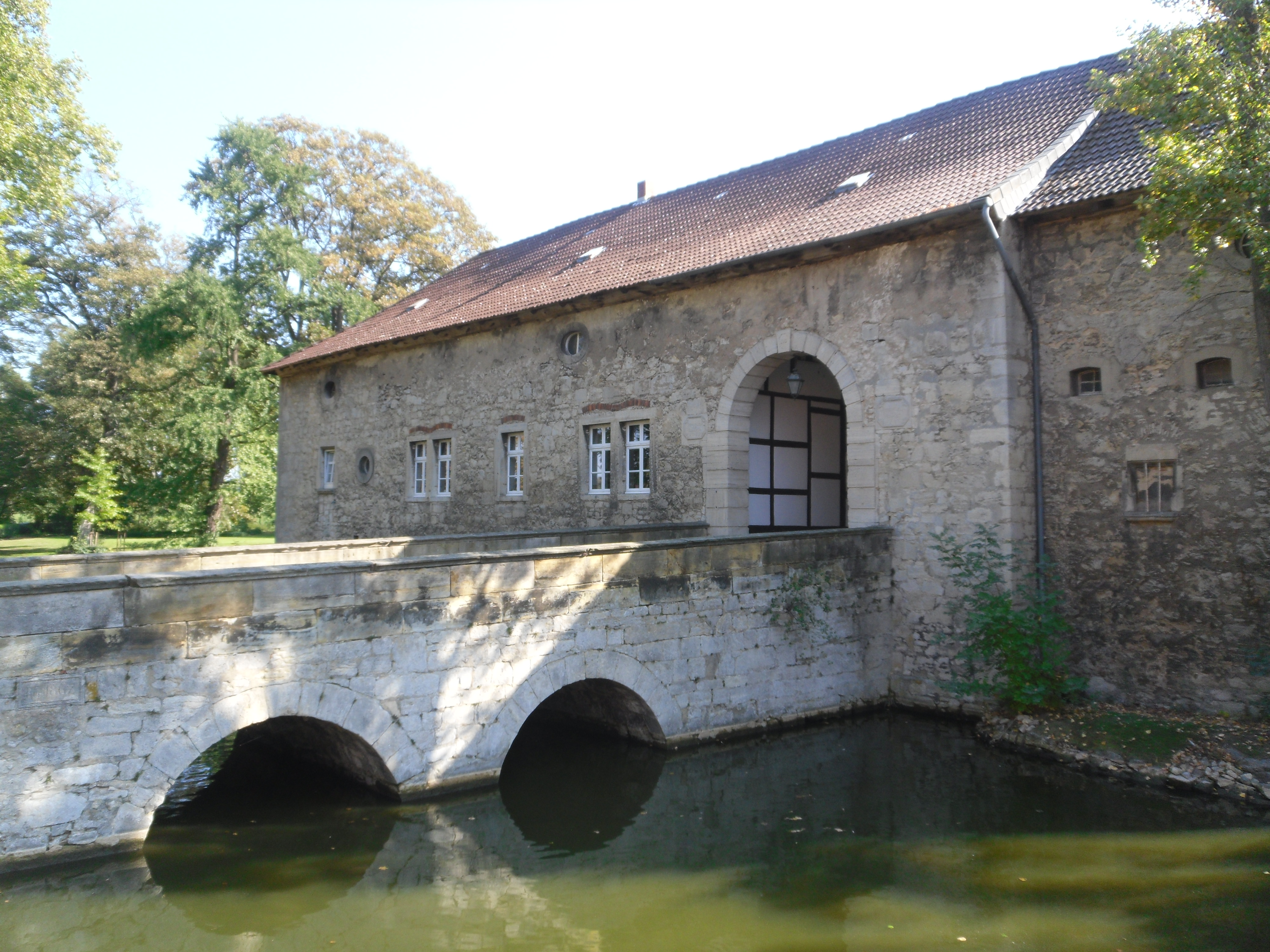 Eingang zum Wasserschloss in Veltheim (Ohe)